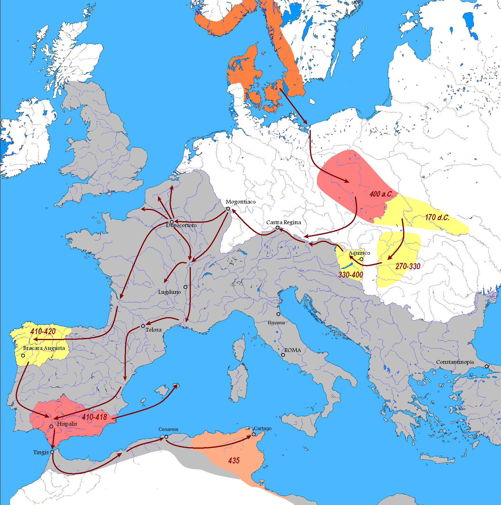 Mapa da migração vândala